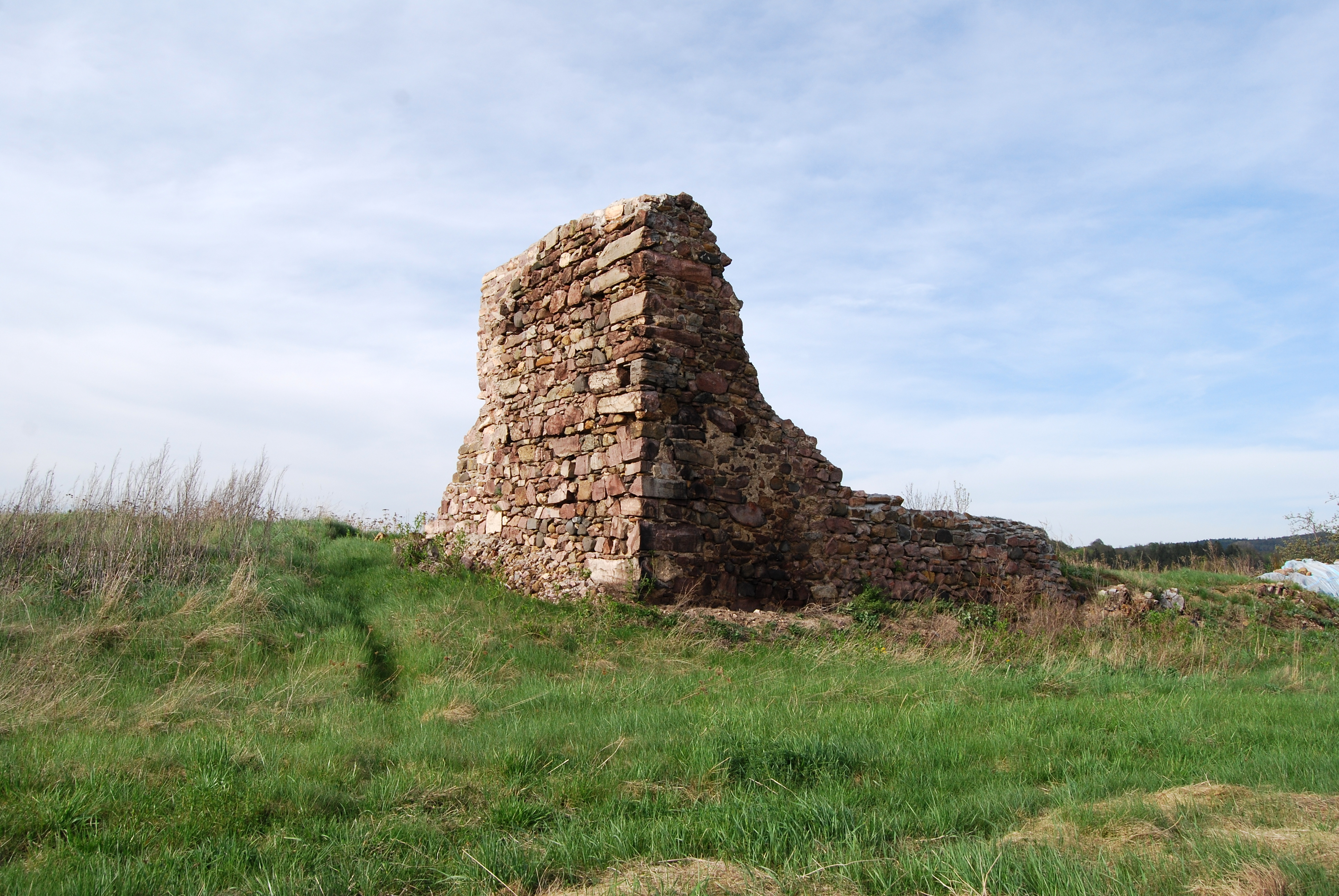 Sędziszowa - kościół św. Katarzyny (ruina), XIII-XIV